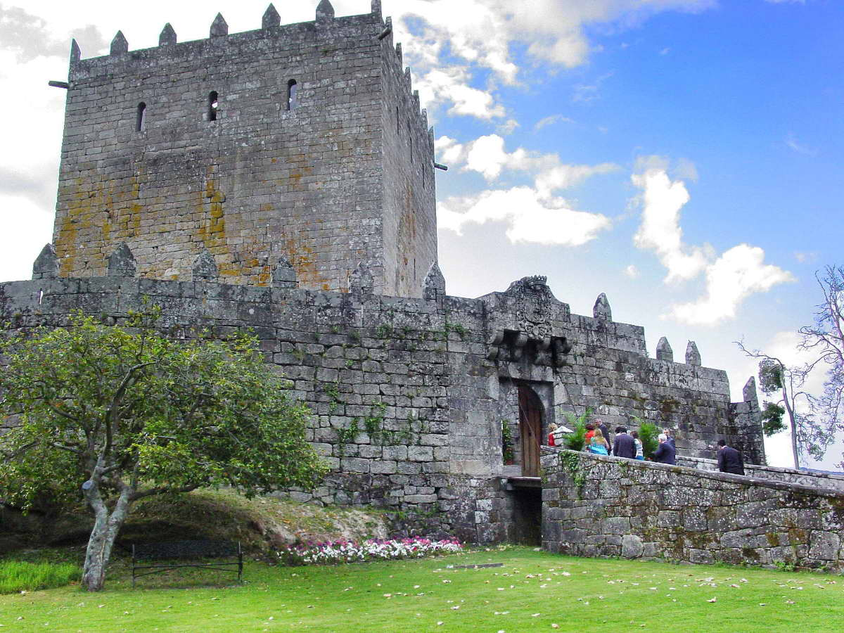 Castelo de Soutomaior, provincia de Pontevedra